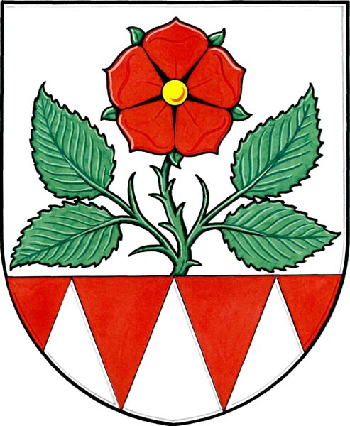 Česky: znak obce Senička